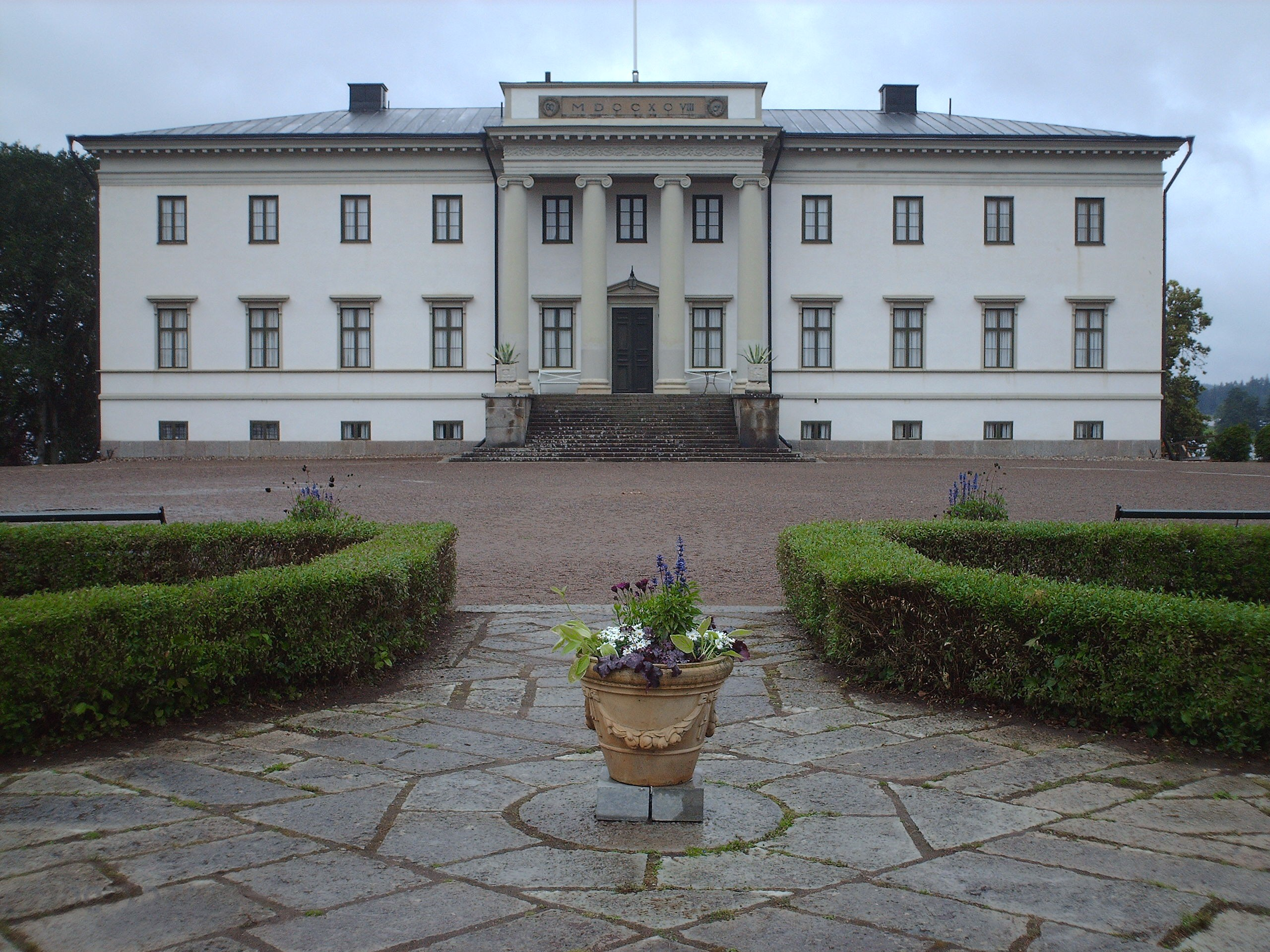 Stjernsund Castle, Sweden